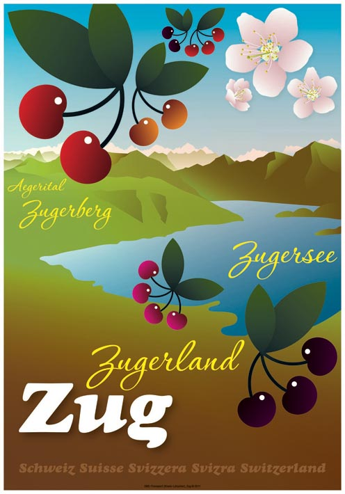 Plakat «Zug-Chriesiland», 2011 gestaltet von den Zuger Grafikern Ueli Kleeb und Caroline Lötscher.